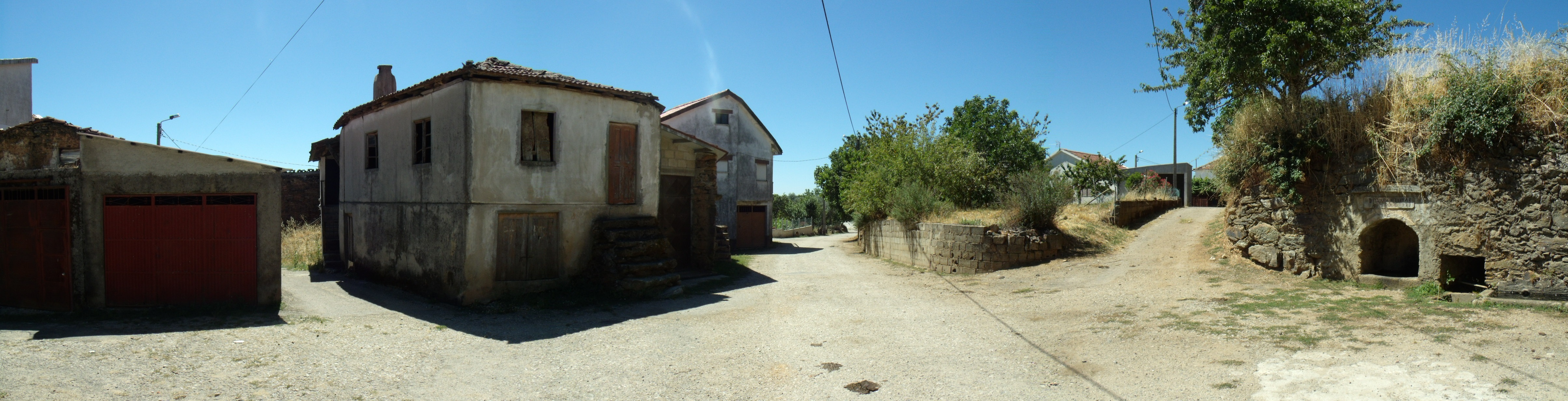 Espinhoso Portugal